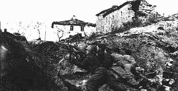 Soldados Brasileiros no primeiro assalto ( Com vitoria da alemanha)